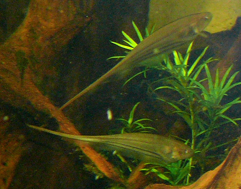 Eigenmannia lineata = Syn. Eigenmannia virescens (Says FishBase)